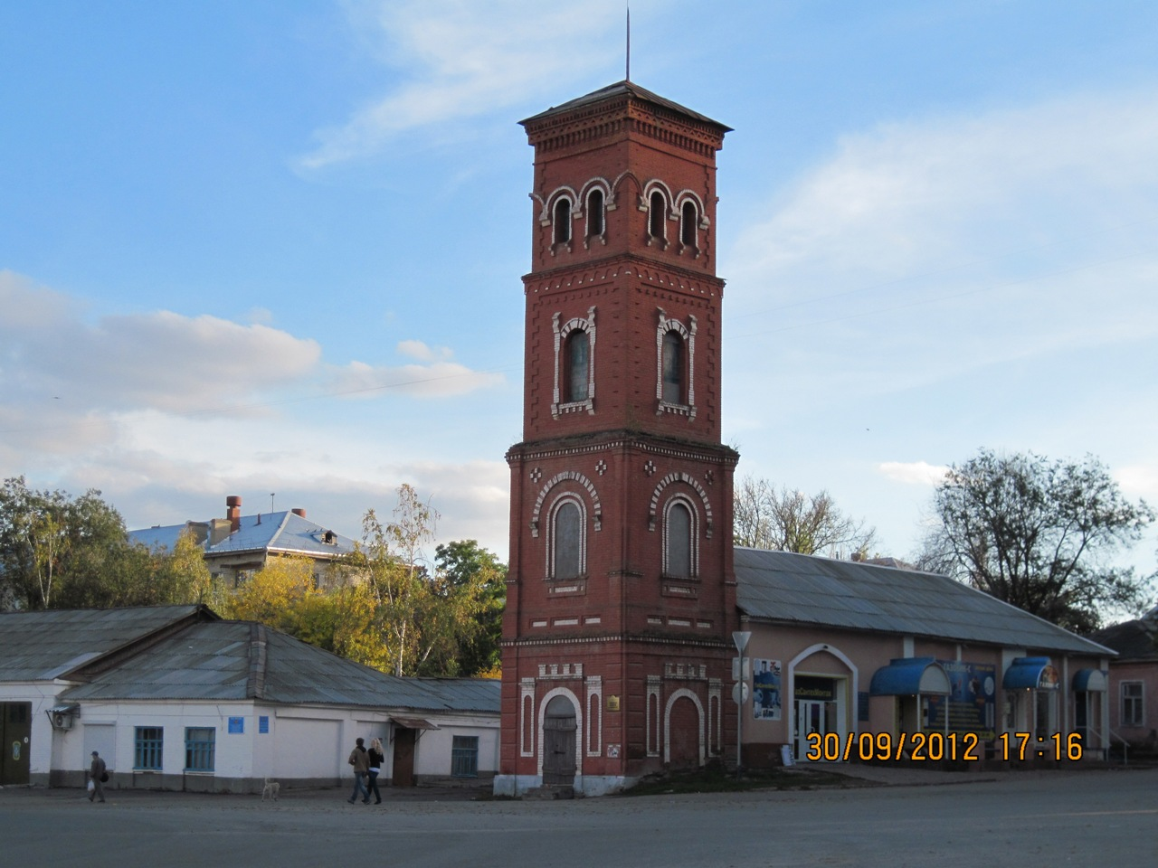 Г. Вольск Первомайская-1 Пожарная каланча